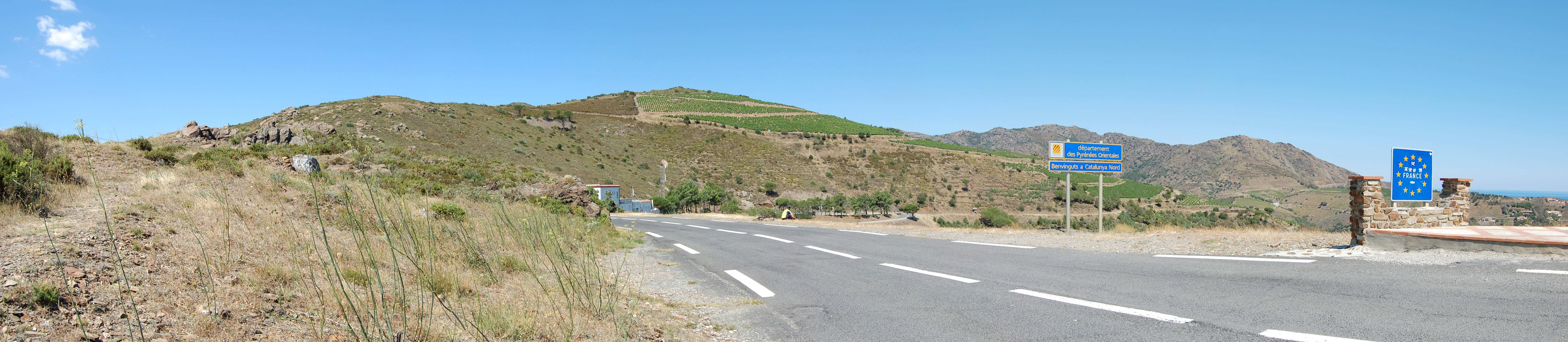 Vue panoramique du Col des Balistres, entre Cerbère (France) et Portbou (Espagne). Travail personnel, sous licence CC-BY-SA-3.0. Appareil photo utilisé : Nikon D40